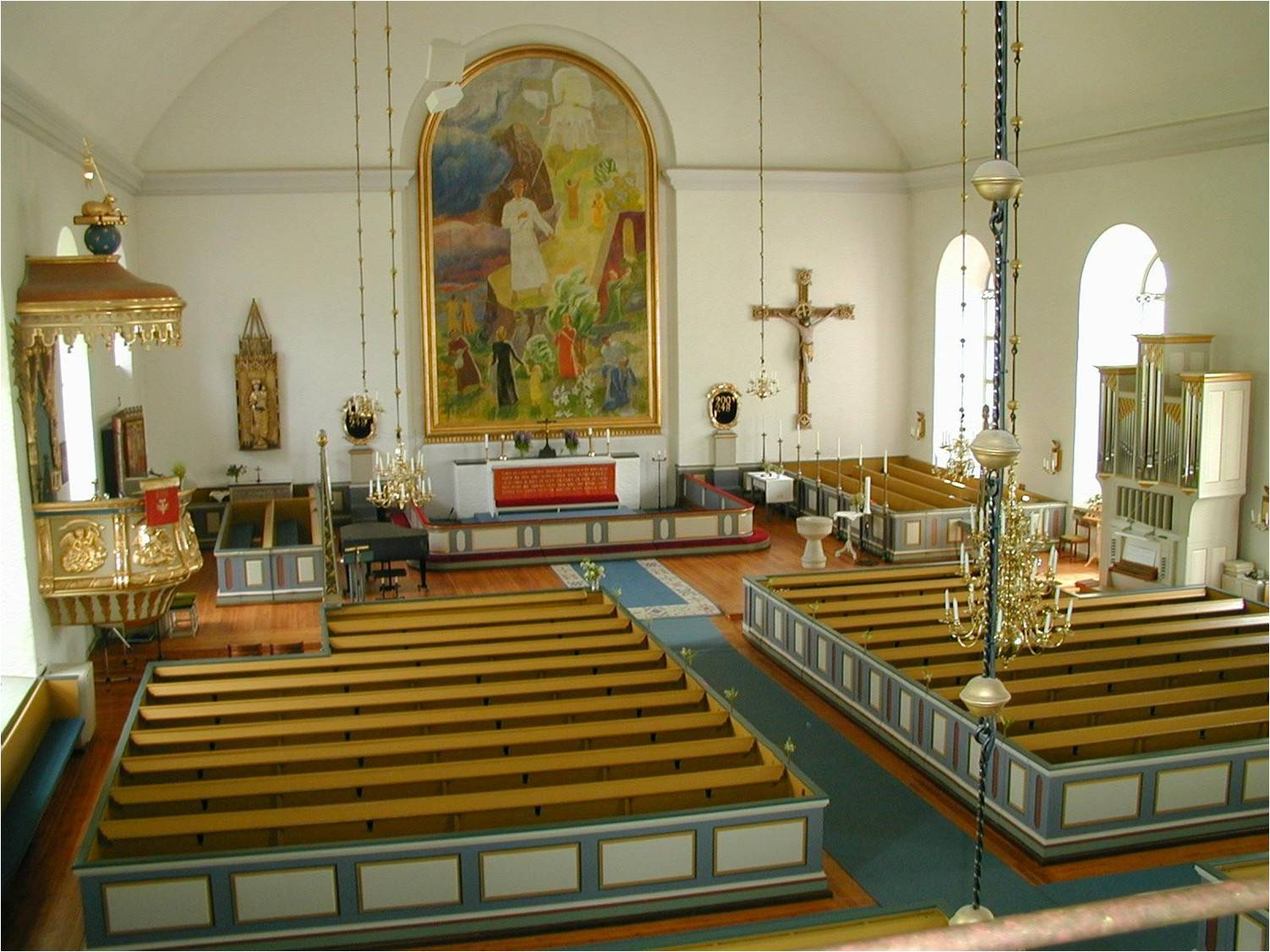 Forsa kyrka, kyrkorummet mot öster.